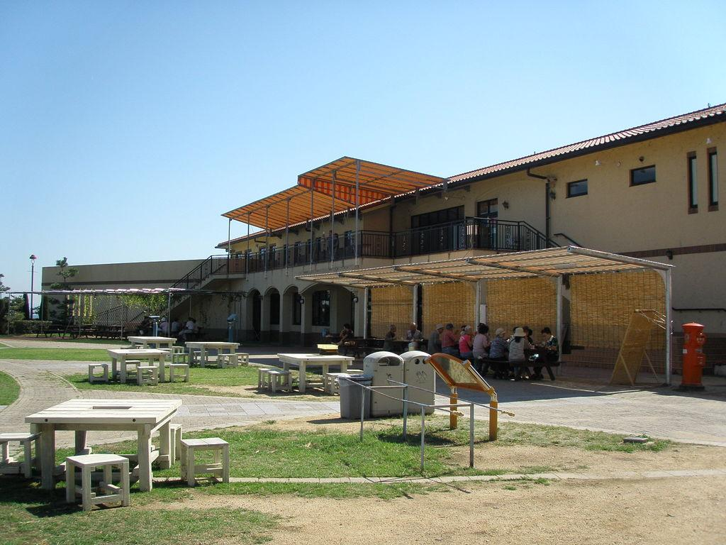 道の駅あわじ、海側から見た建物。